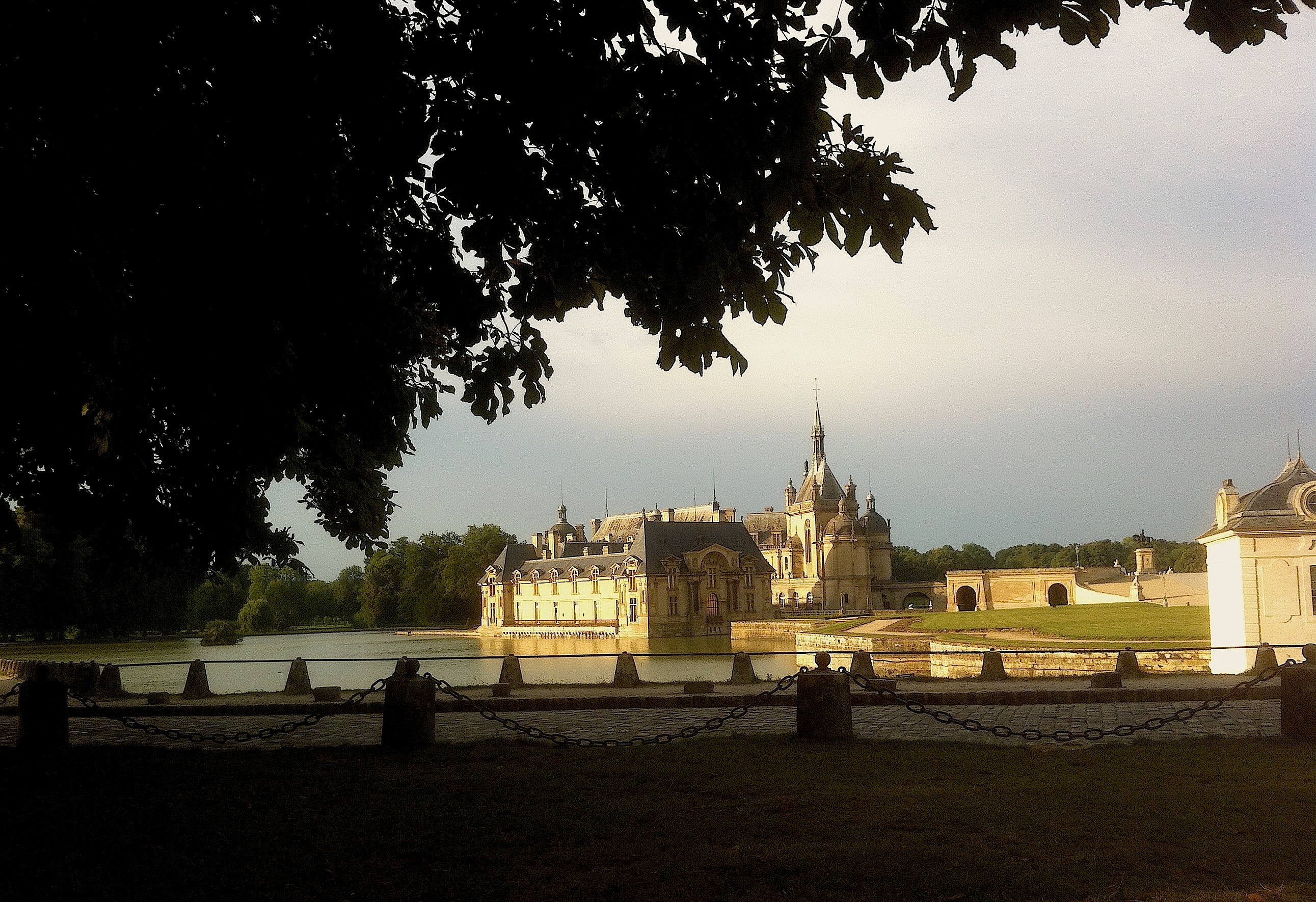 Chantilly, crépuscule, sérénité